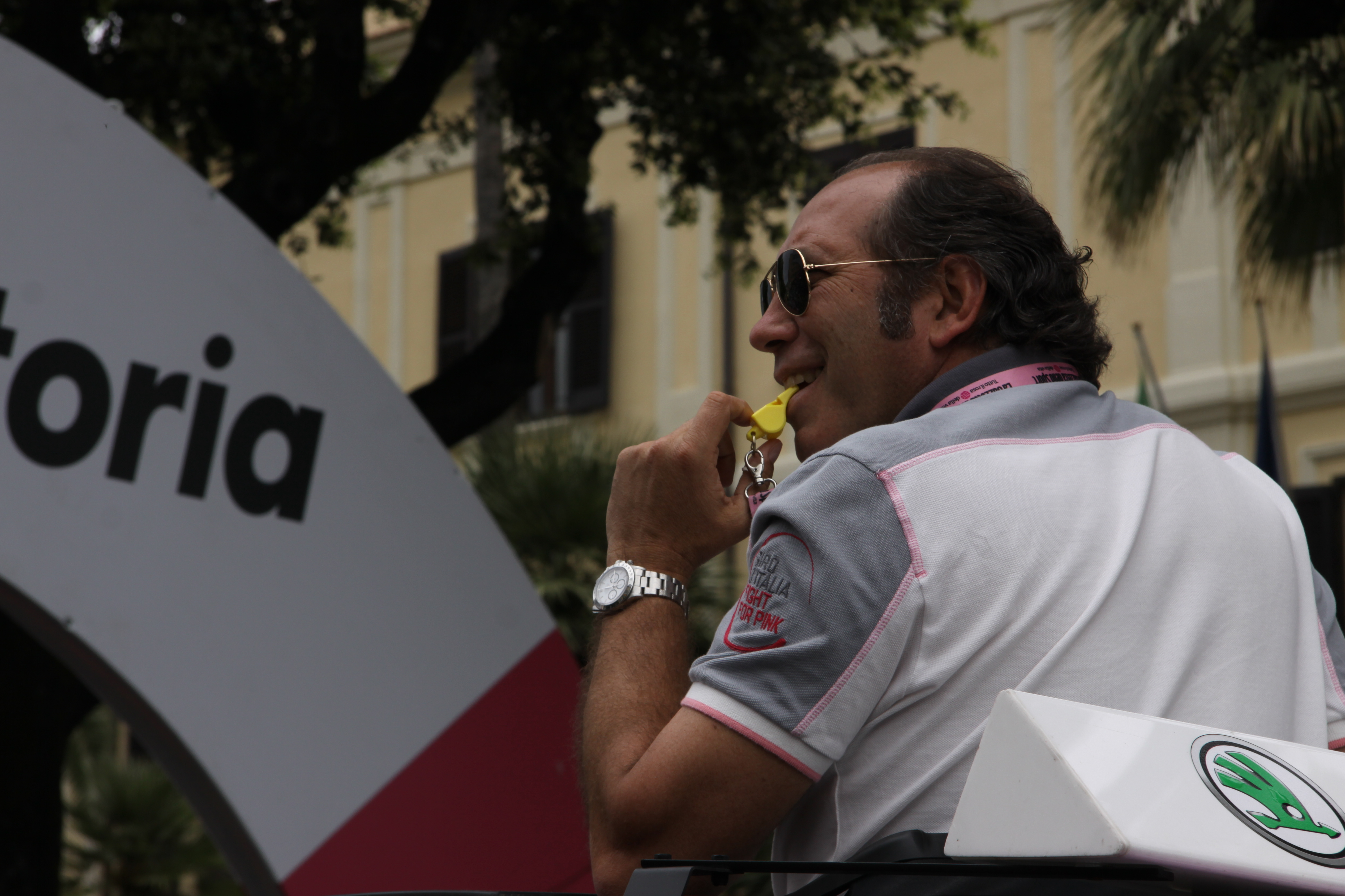 Stefano Allocchio.